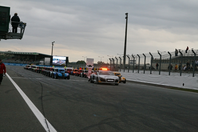 Le Mans